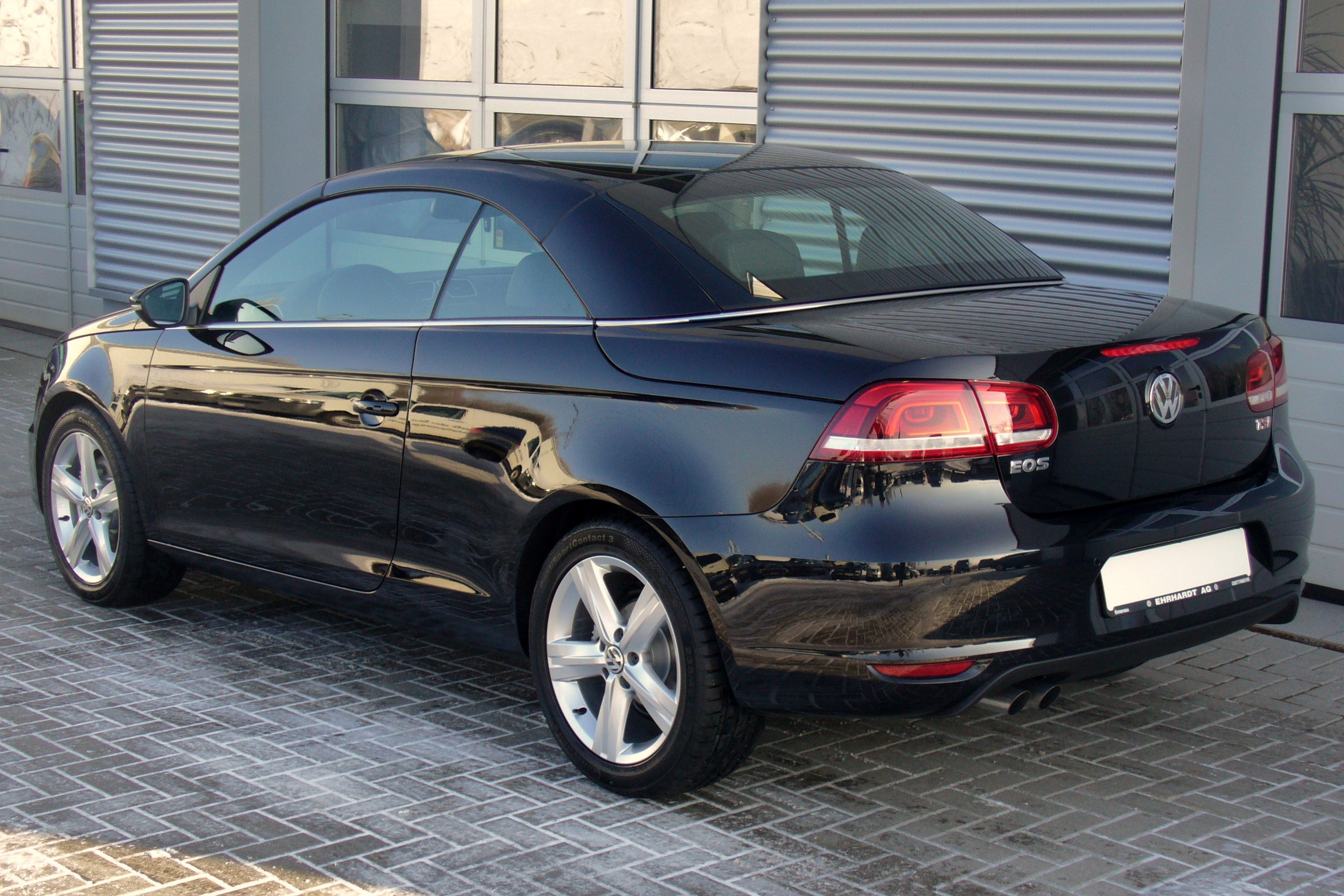 VW Eos Facelift